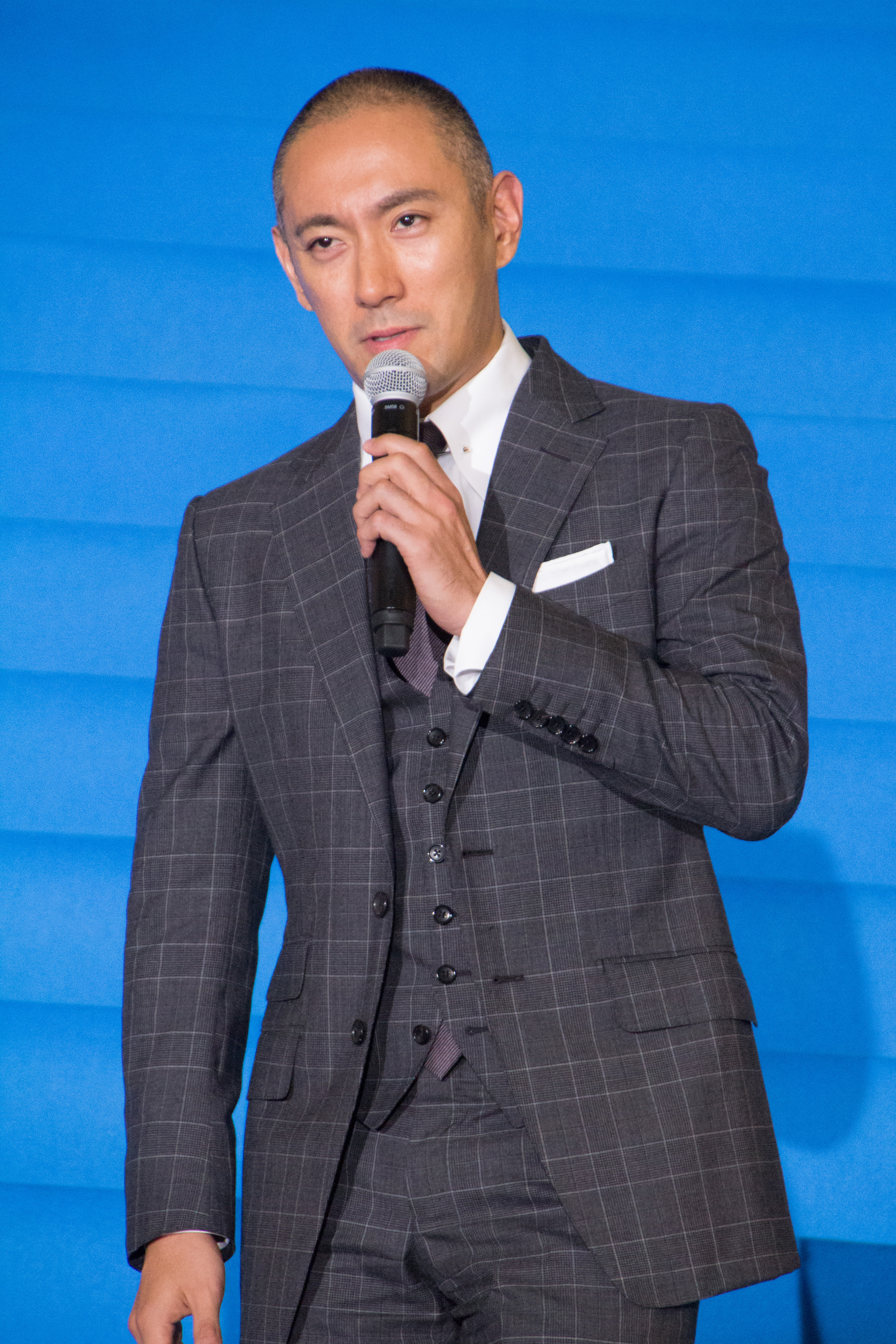 ハドソン川の奇跡 ジャパン・プレミア レッドカーペット 市川海老蔵